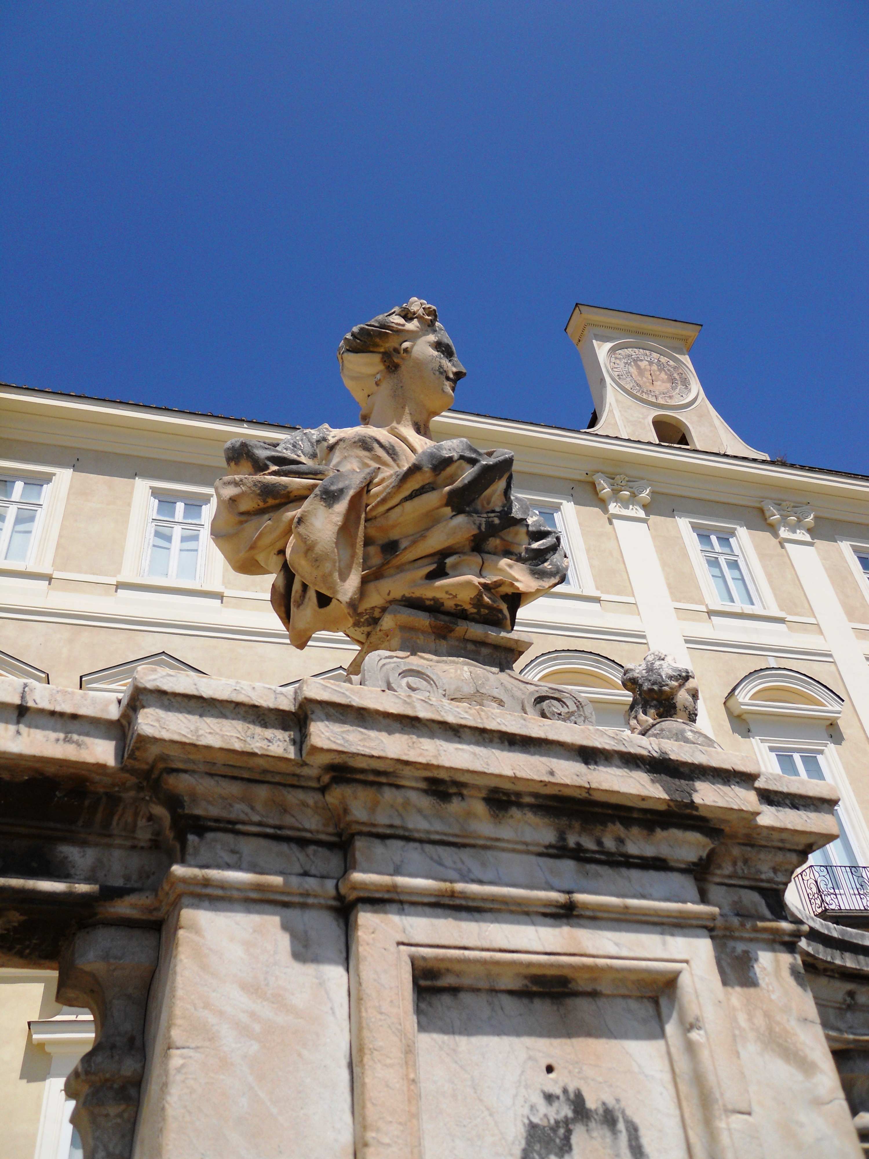 Il Palazzo Reale di Portici